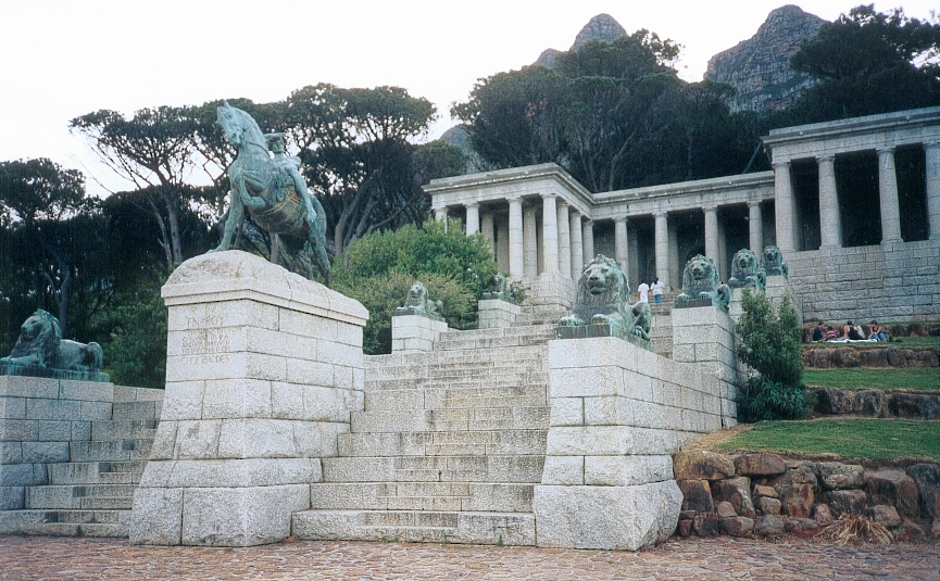 FC Georgio (1998)